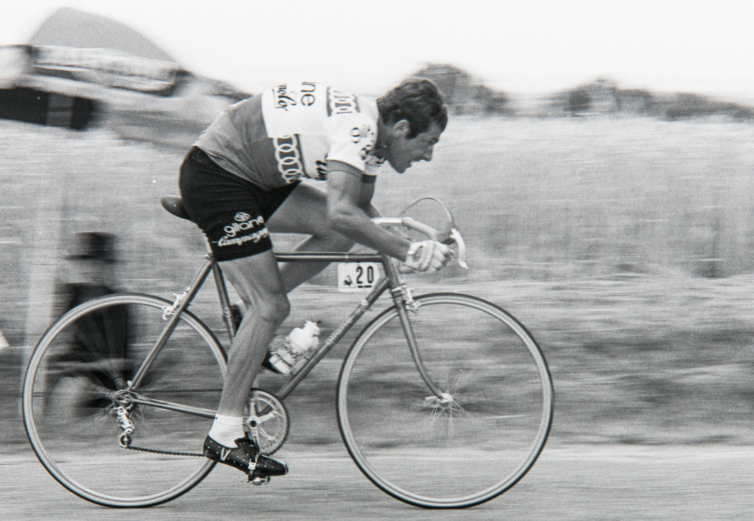 Sylvain Vasseur durant le Tour de France 1976. Photographie : René Milanese